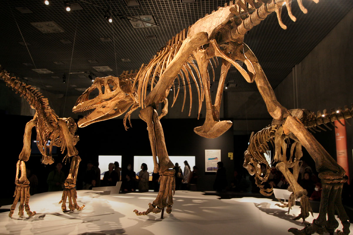 Mapusaurus - 03